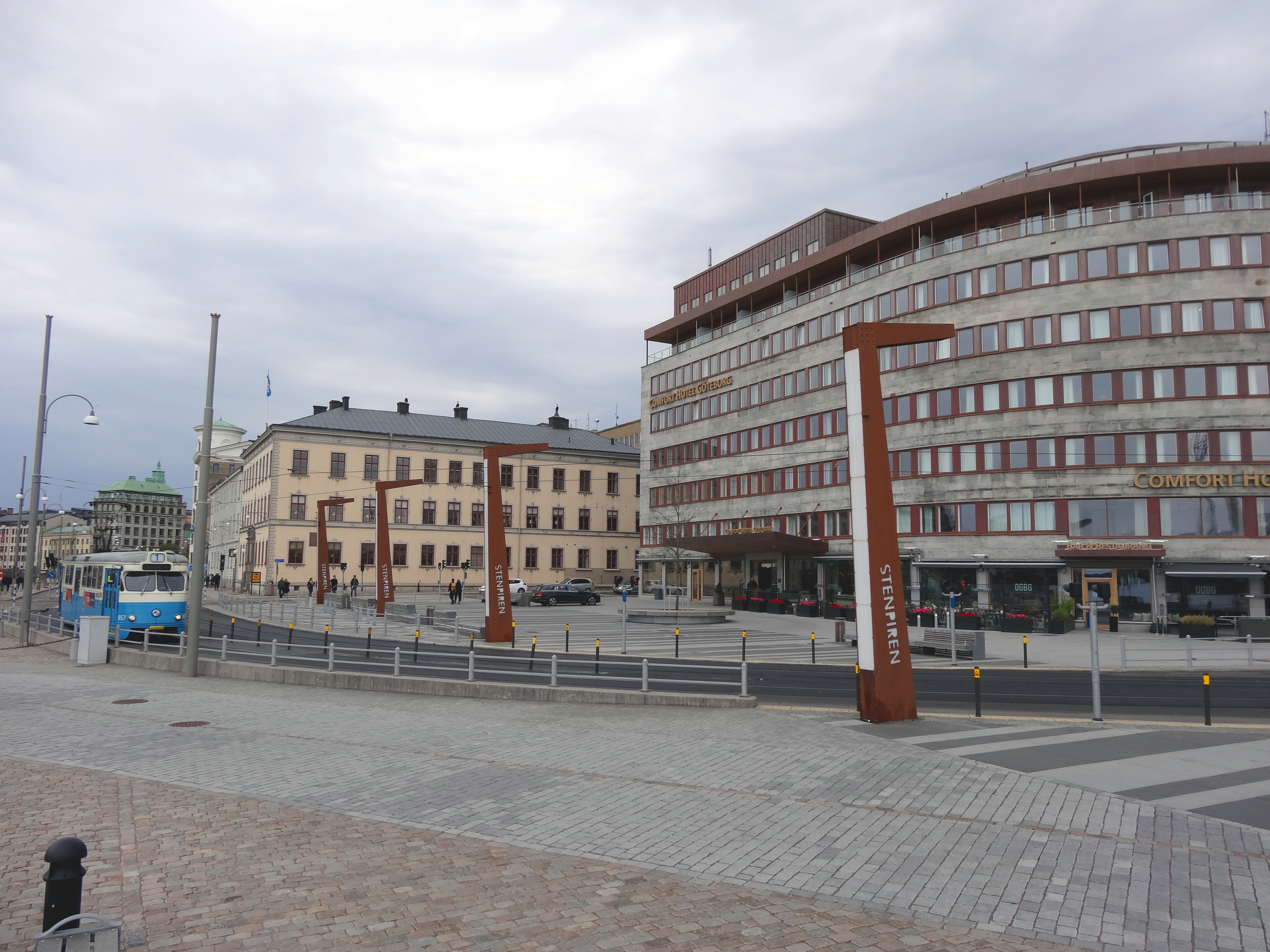 Skeppsbroplatsen i Göteborg år 2017. Vy söderut från Stenpirens resecentrum.